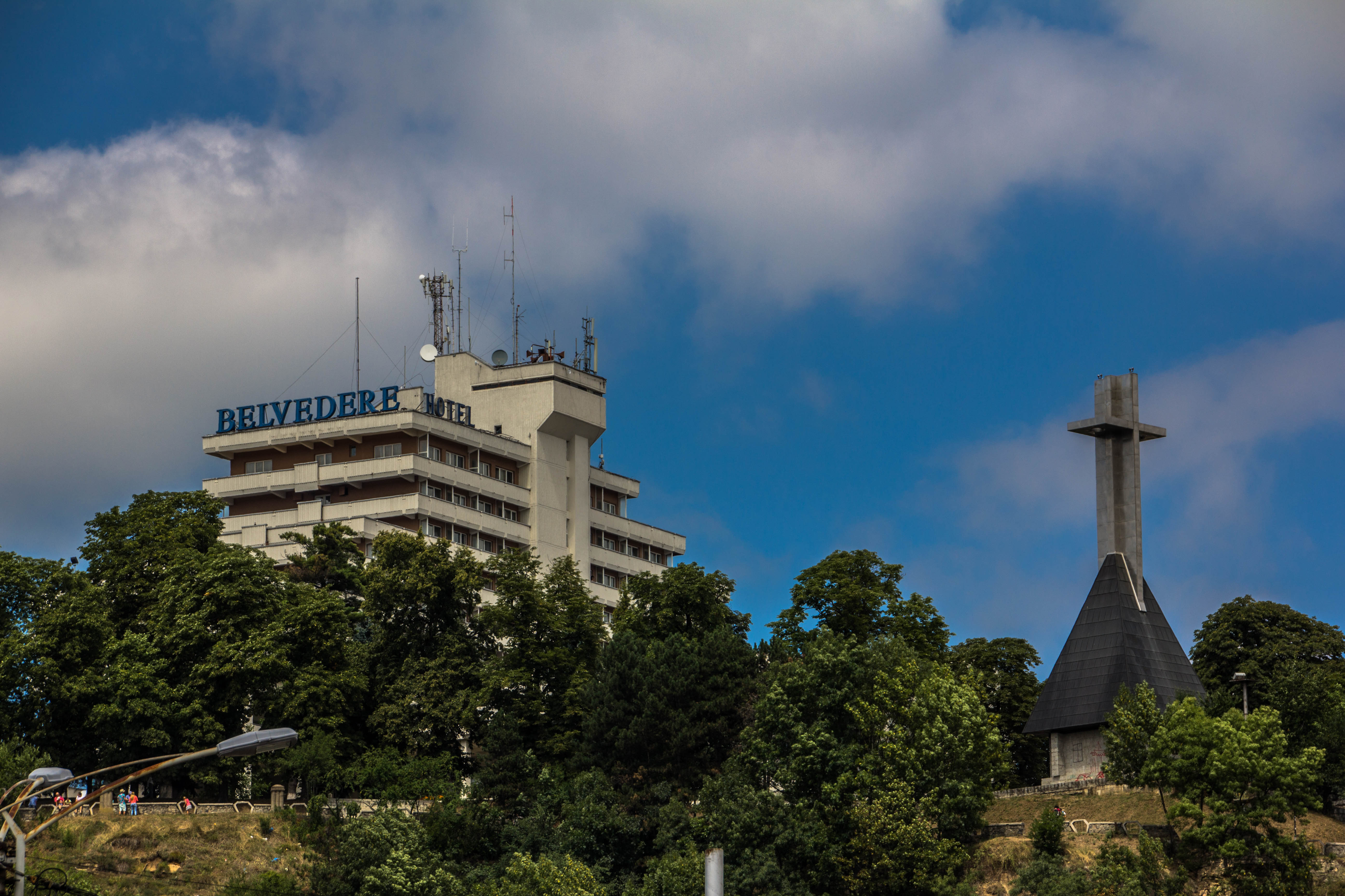 Cetățuia Cluj-Napoca